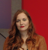 Luci van Org bei einer SPD-Wahlkampfkundgebung auf dem Domplatz in Magdeburg am Donnerstag, dem 3. September 2009